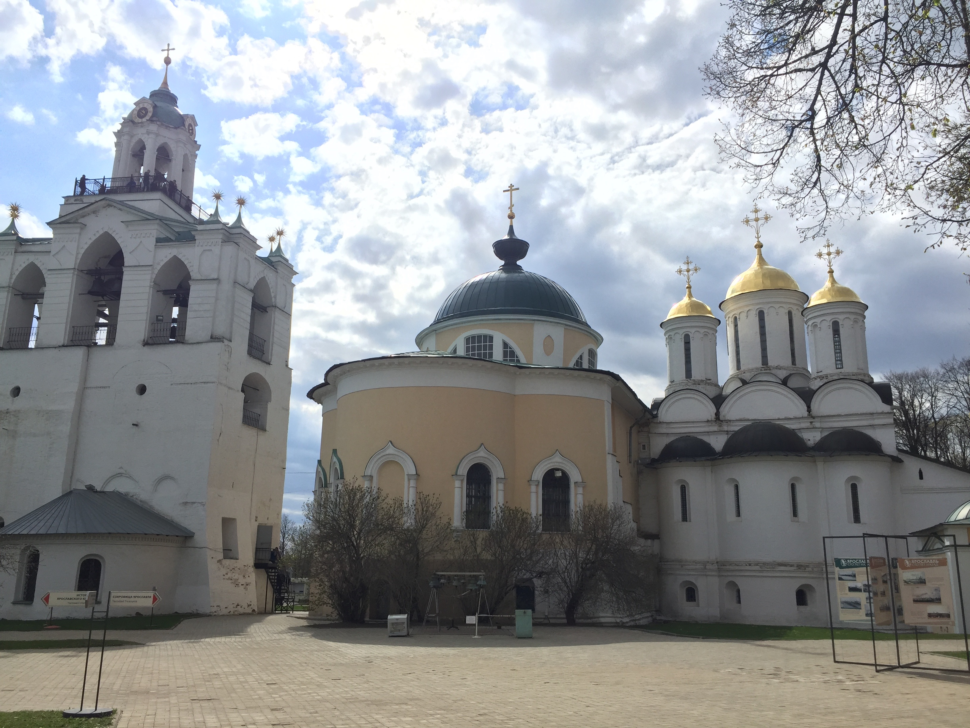 На территории Ярославского Кремля